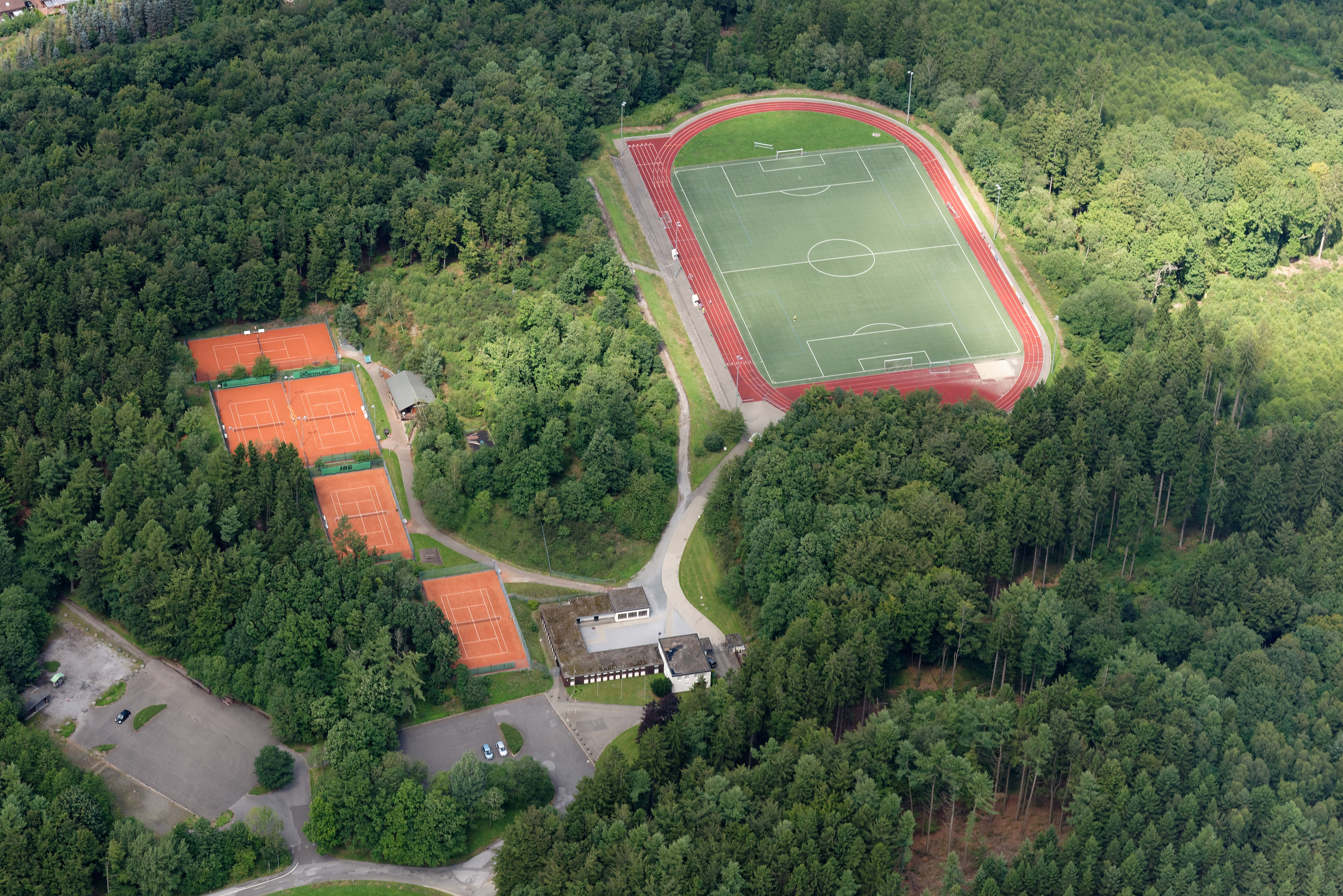 Luftaufnahme: Waldstadion von Neuenrade mit Tennisplätzen, Nordrhein-Westfalen